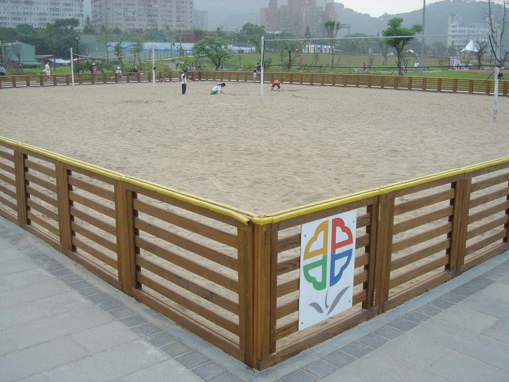 台北縣新店市陽光運動公園沙灘排球場。